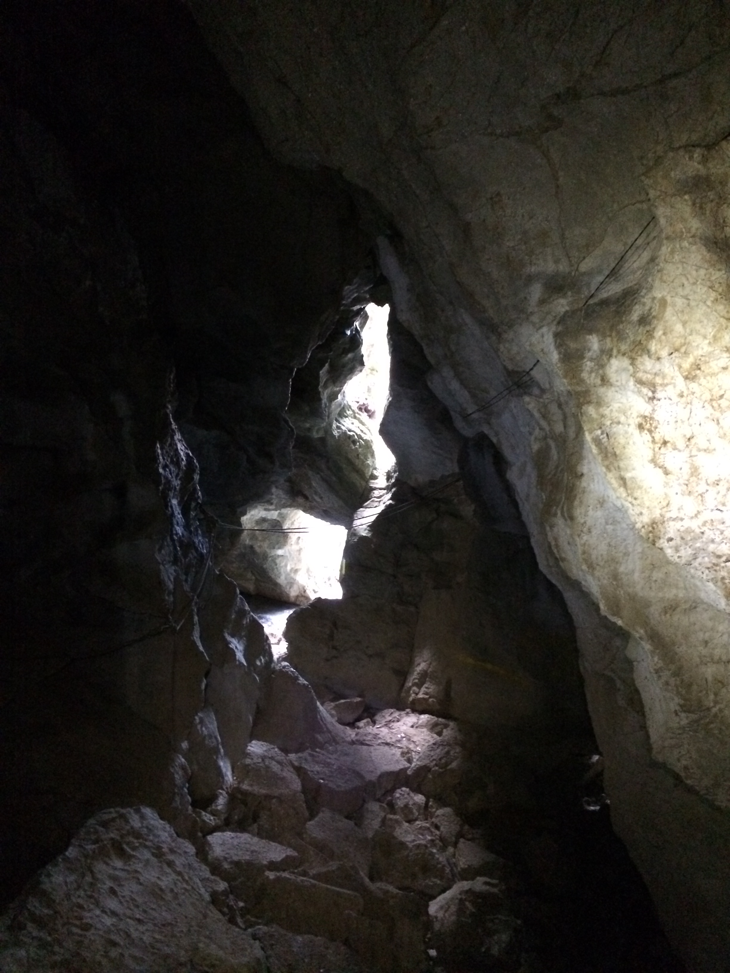 Galerie principale de la grotte de la Cascade